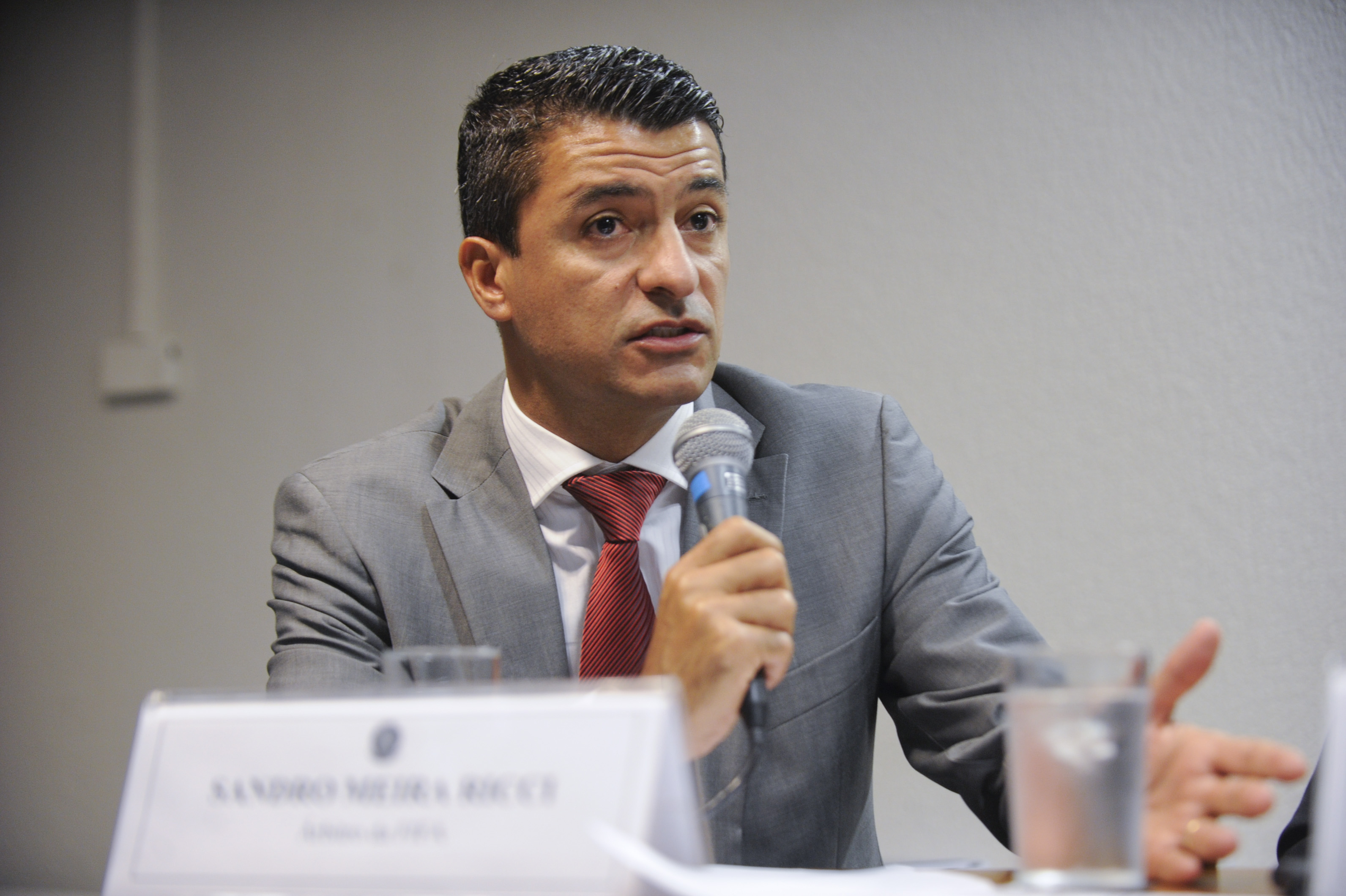 Sala de comissões do Senado Federal durante reunião realizada pela Comissão Mista da Medida Provisoria (CMMPV) sobre MP 671/2015 que cria o programa de modernização da gestão e de responsabilidade fiscal do futebol brasileiro. Árbitro da FIFA, Sandro Meira Ricci á mesa. Foto: Jefferson Rudy/Agência Senado